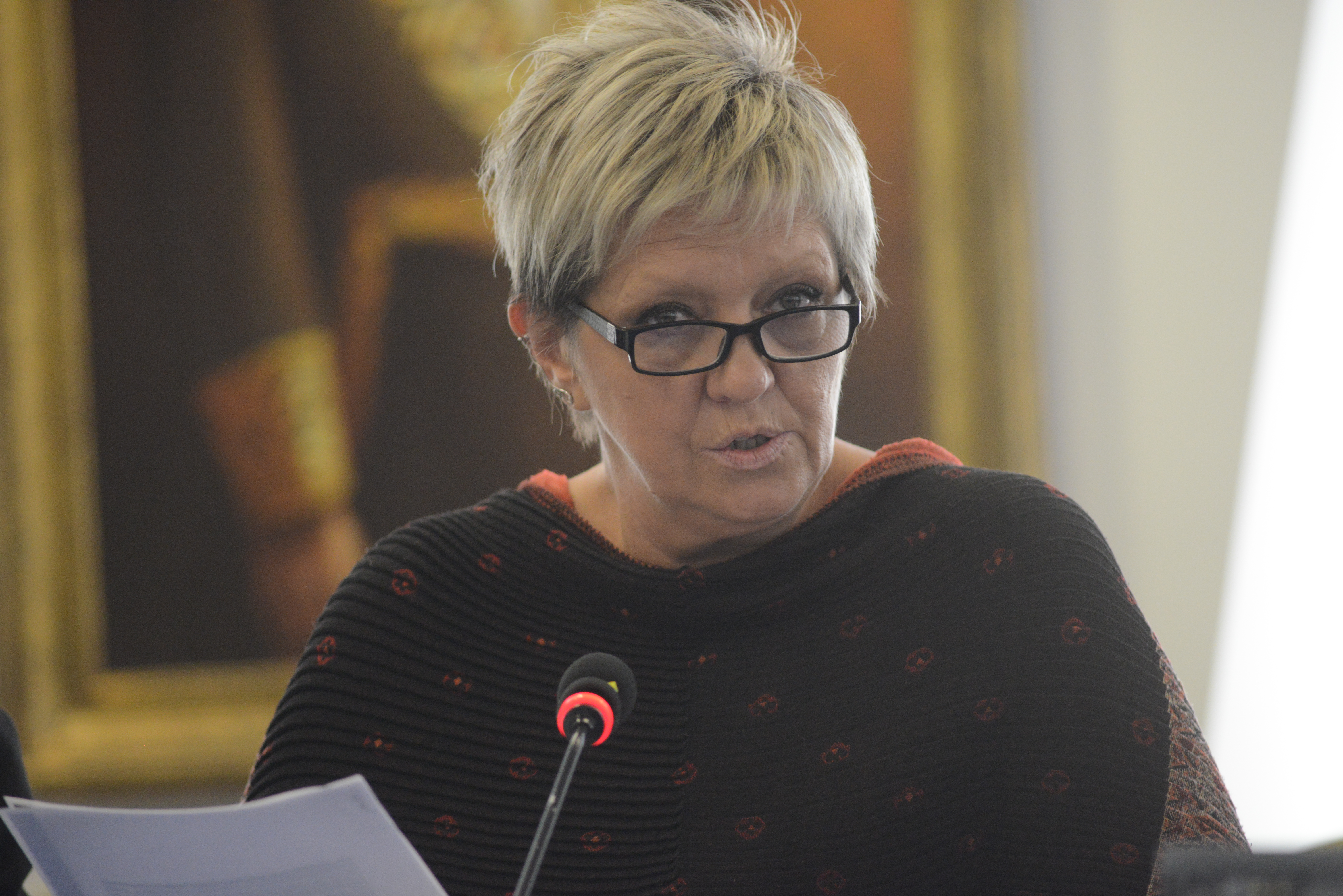 154 Período Ordinario de Sesiones 16 de marzo de 2015 Peticionaria de la audiencia: Lilian Abracinskas (Mujer y Salud en Uruguay) Crédito de la foto: Daniel Cima